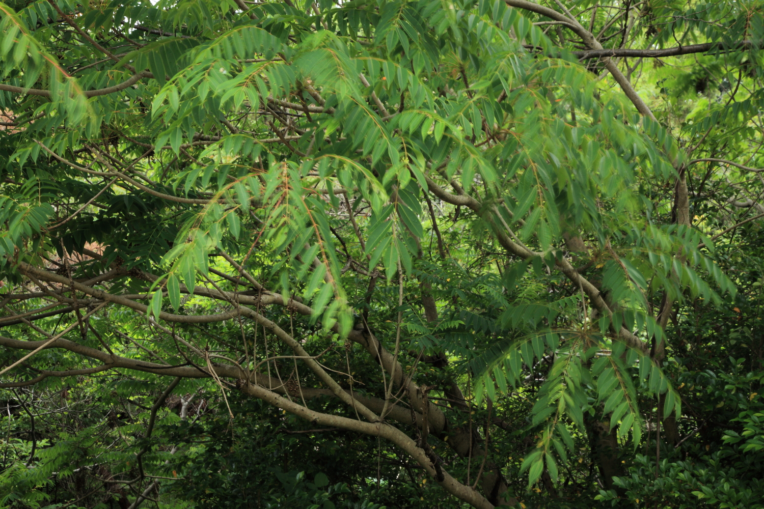 二村山のハゼノキ（豊明市、2012年）